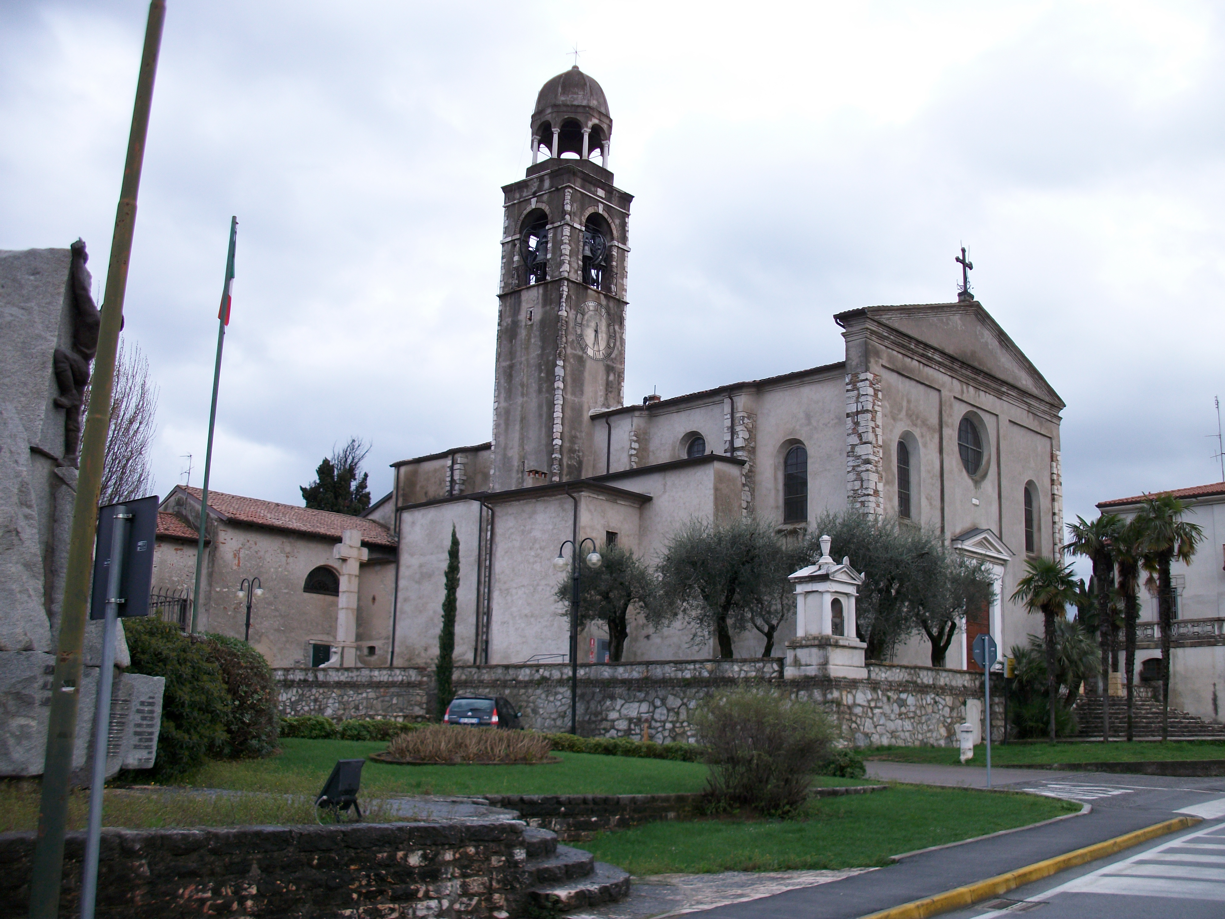 Pfarrkirche Santi Felice